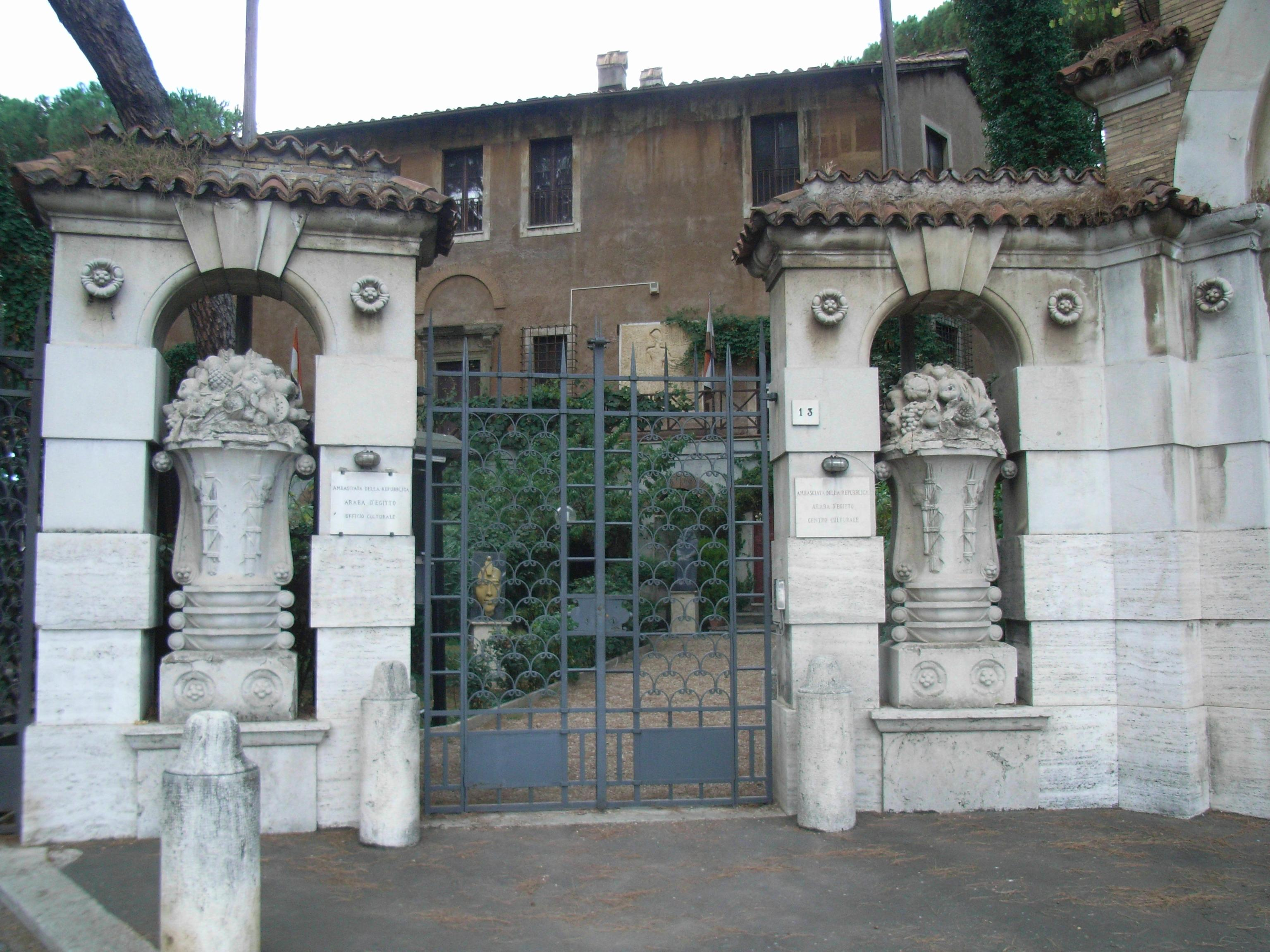 Ufficio culturale dell'ambasciata della Repubblica d'Egitto, via delle Terme di Traiano, Roma.